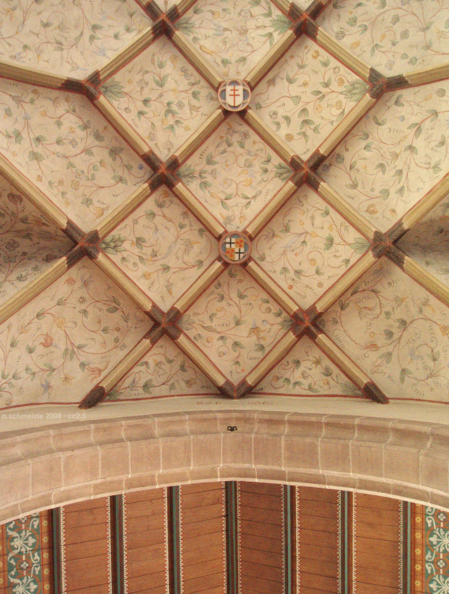 St.-Ulrichs-Kirche in Brackenheim-Stockheim, Netzgewölbe im Chor